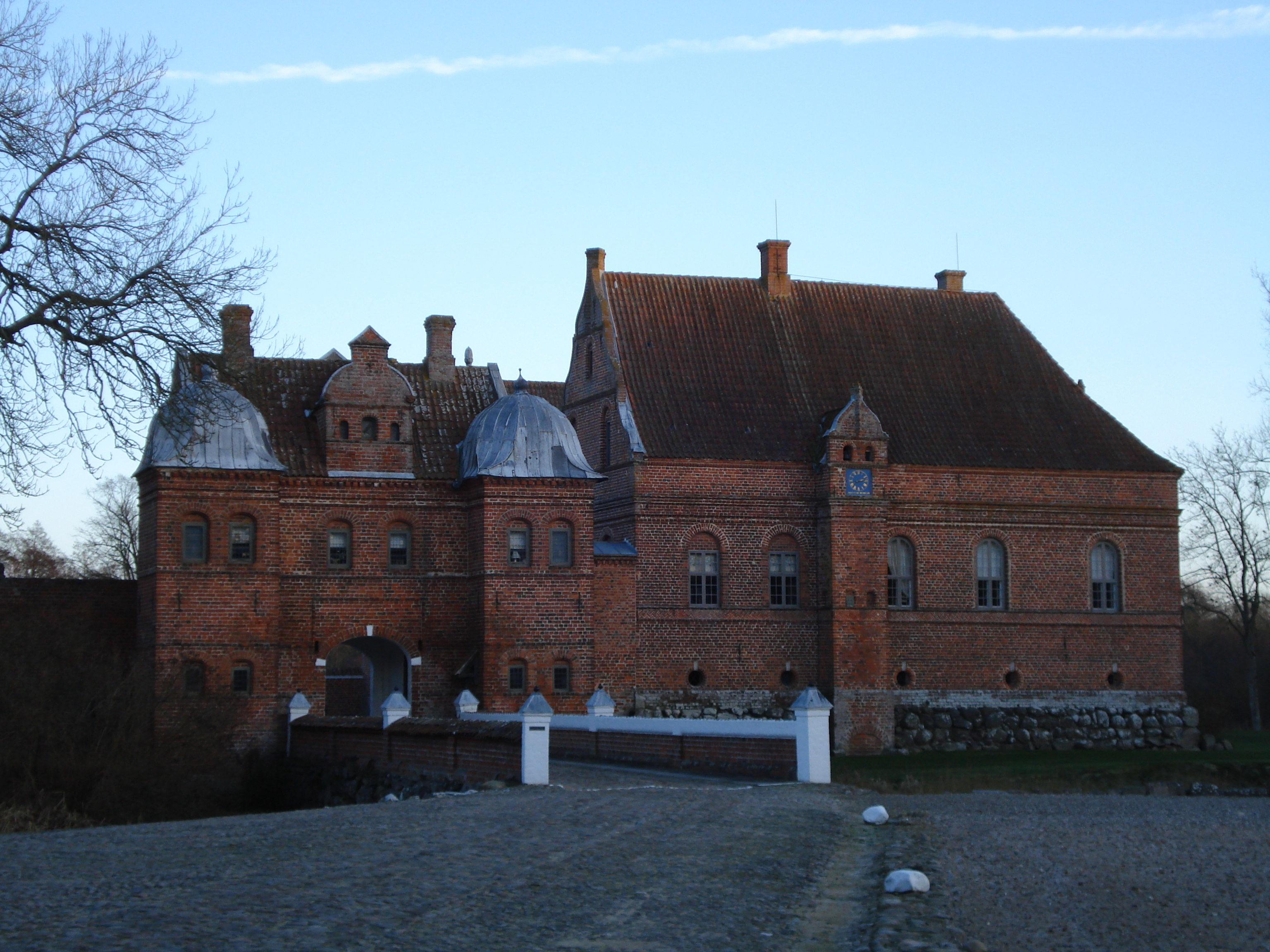 Skaføgaard Manor, Jutland, Denmark